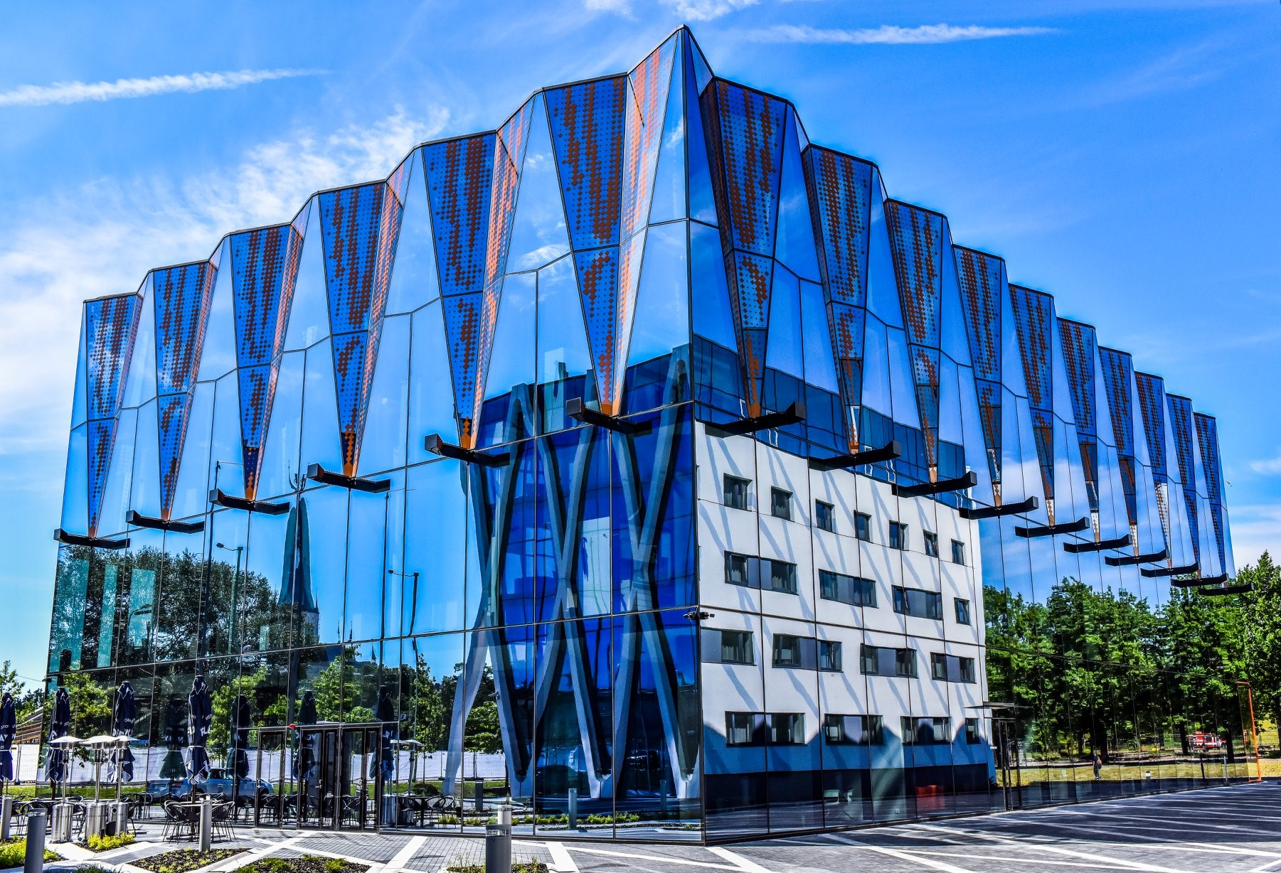 Eesti Gaasi peakontor, Sadama 7